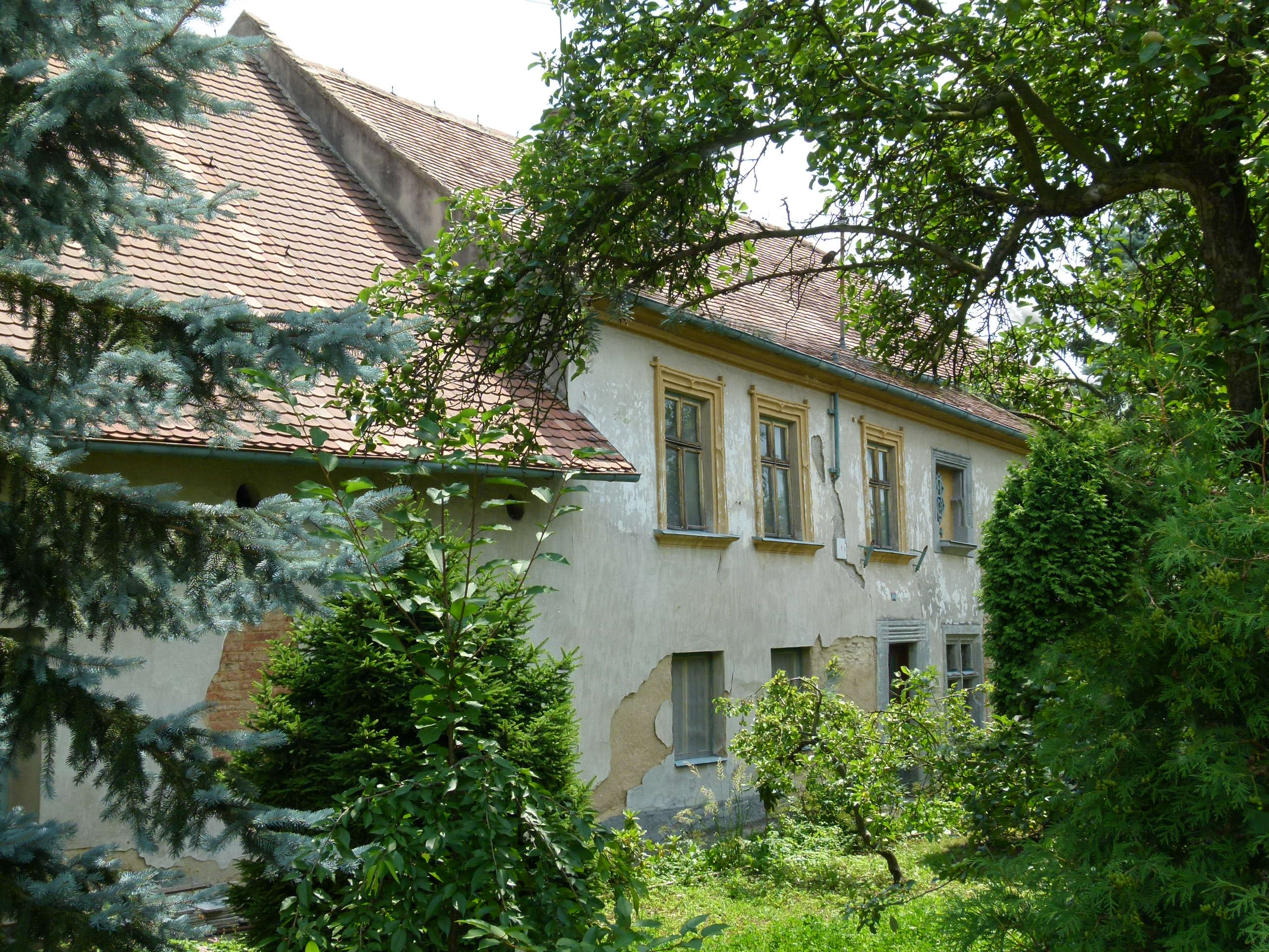 Tvrz (Zaječice), Zaječice 64